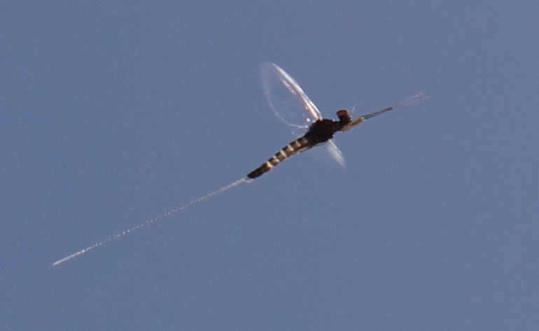 Mayfly No. 2